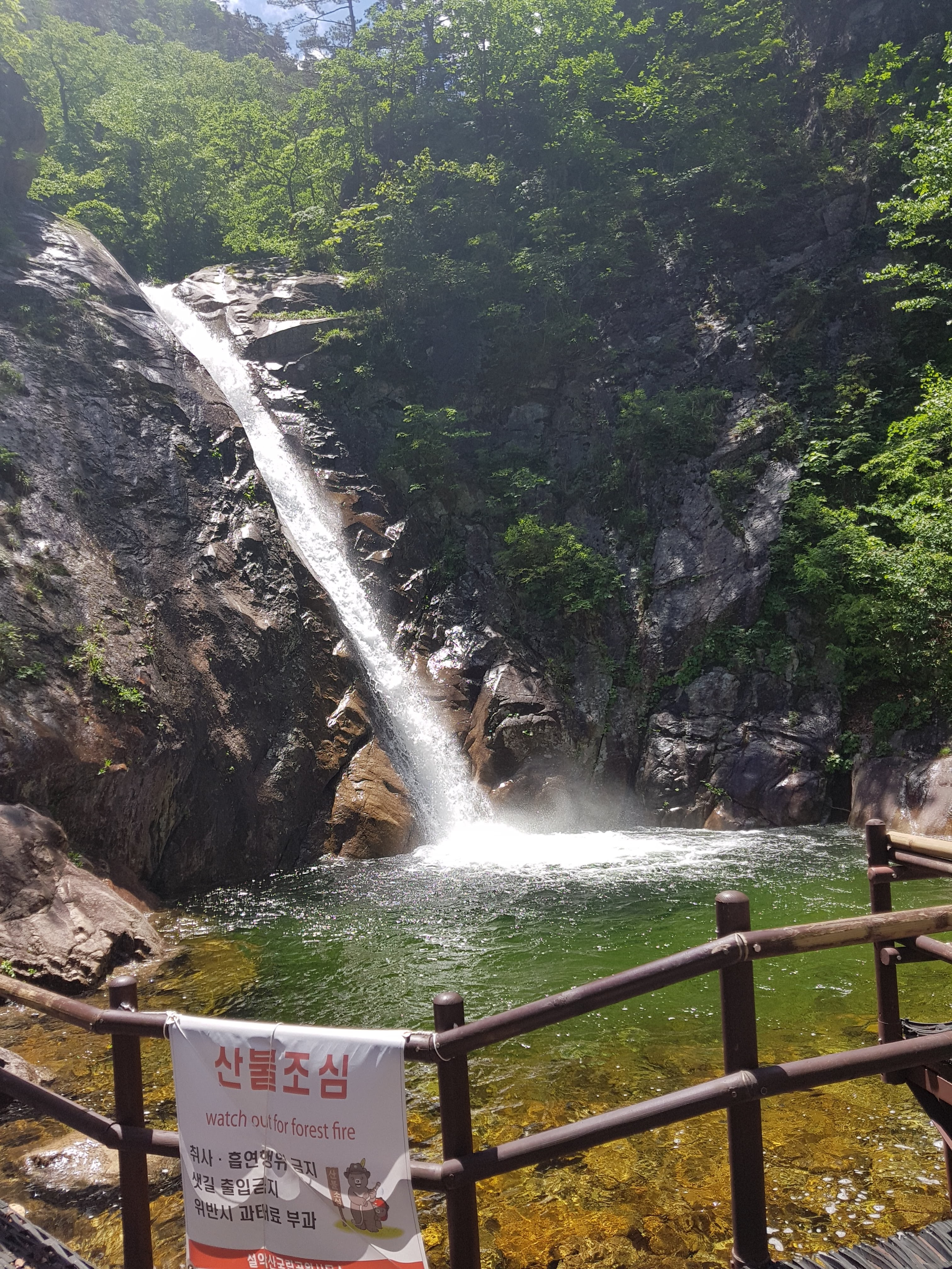 Biryong Falls in Seoraksan